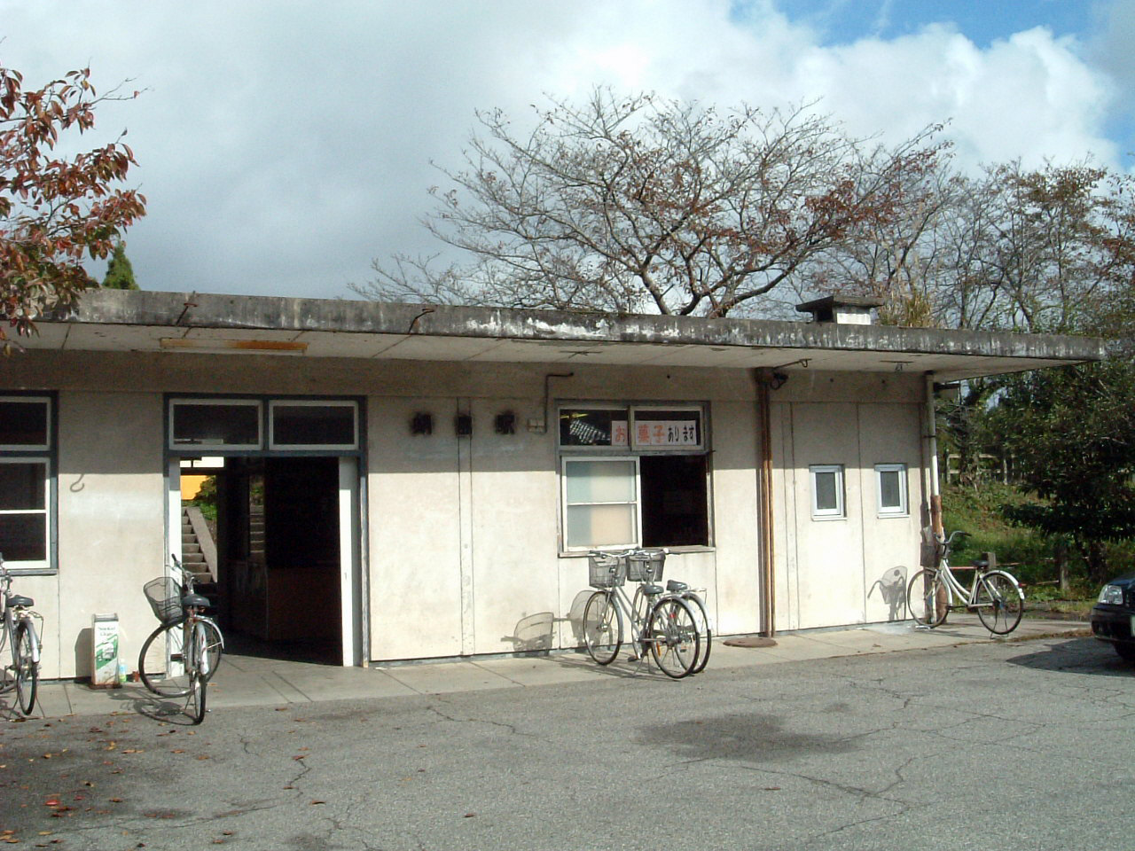 のと鉄道能登線蛸島駅